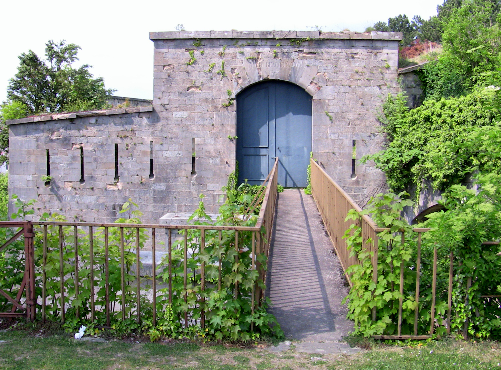 La porte charretière du fort de Beauregard à Besançon (Doubs, France).